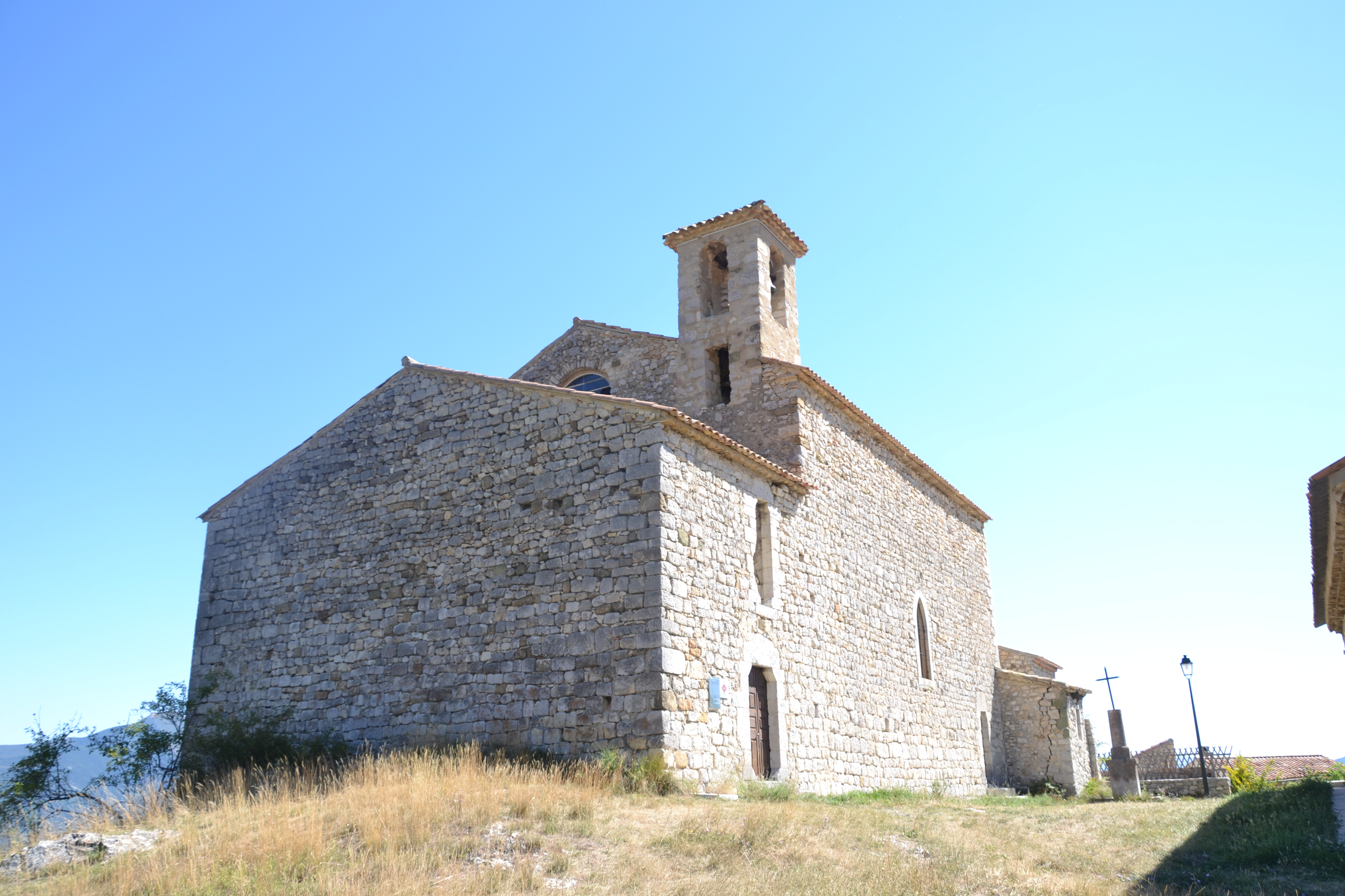 église de Lemps (Drôme) .